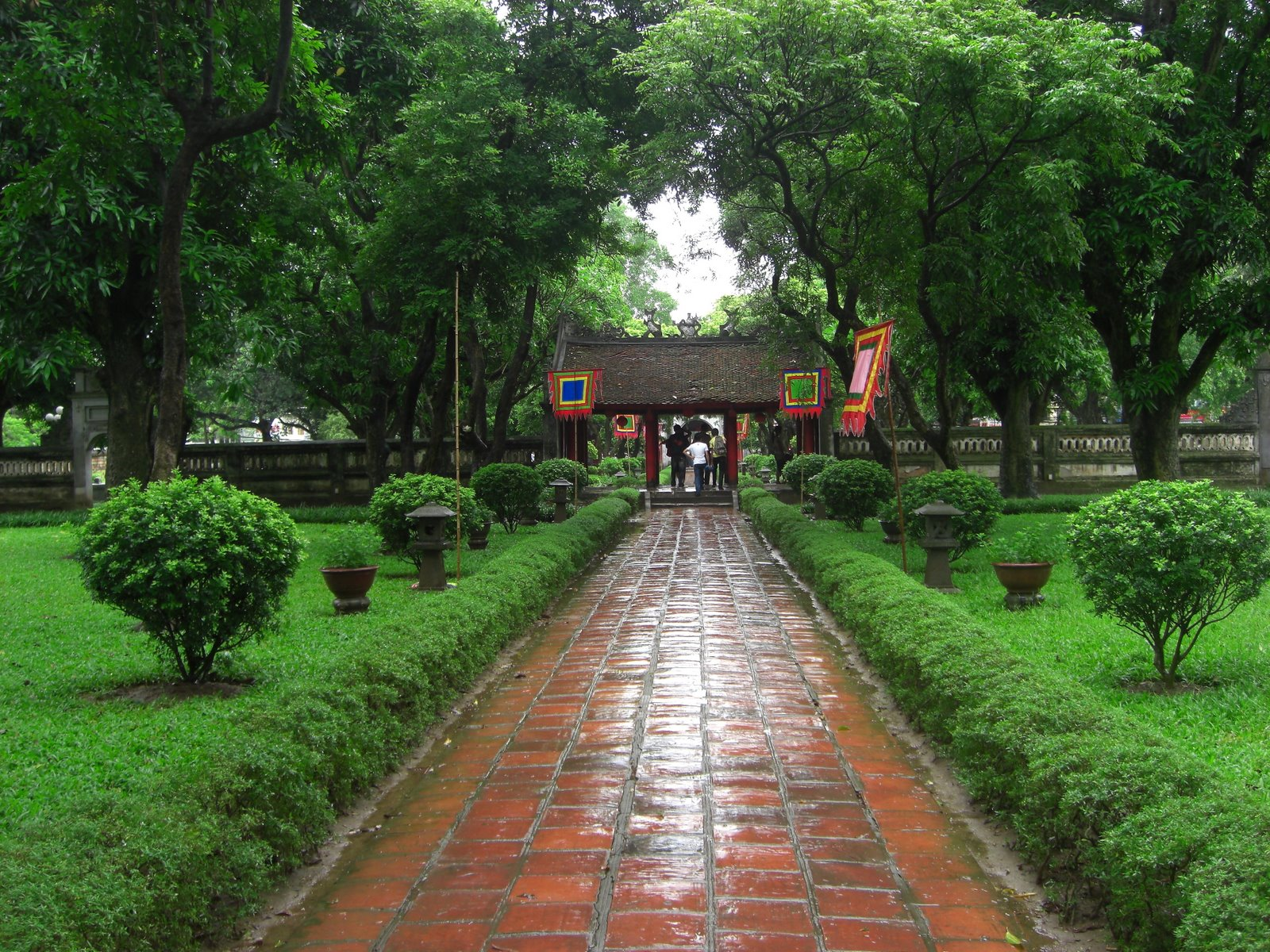 Chemin vers un temple, pluie. Vietnam.